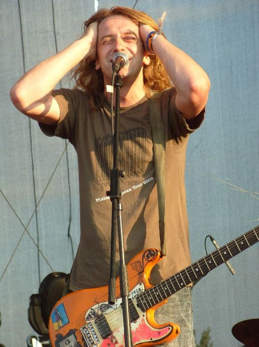 Michal Mareda z Vypsané FiXy na festivalu Rock for People 2008